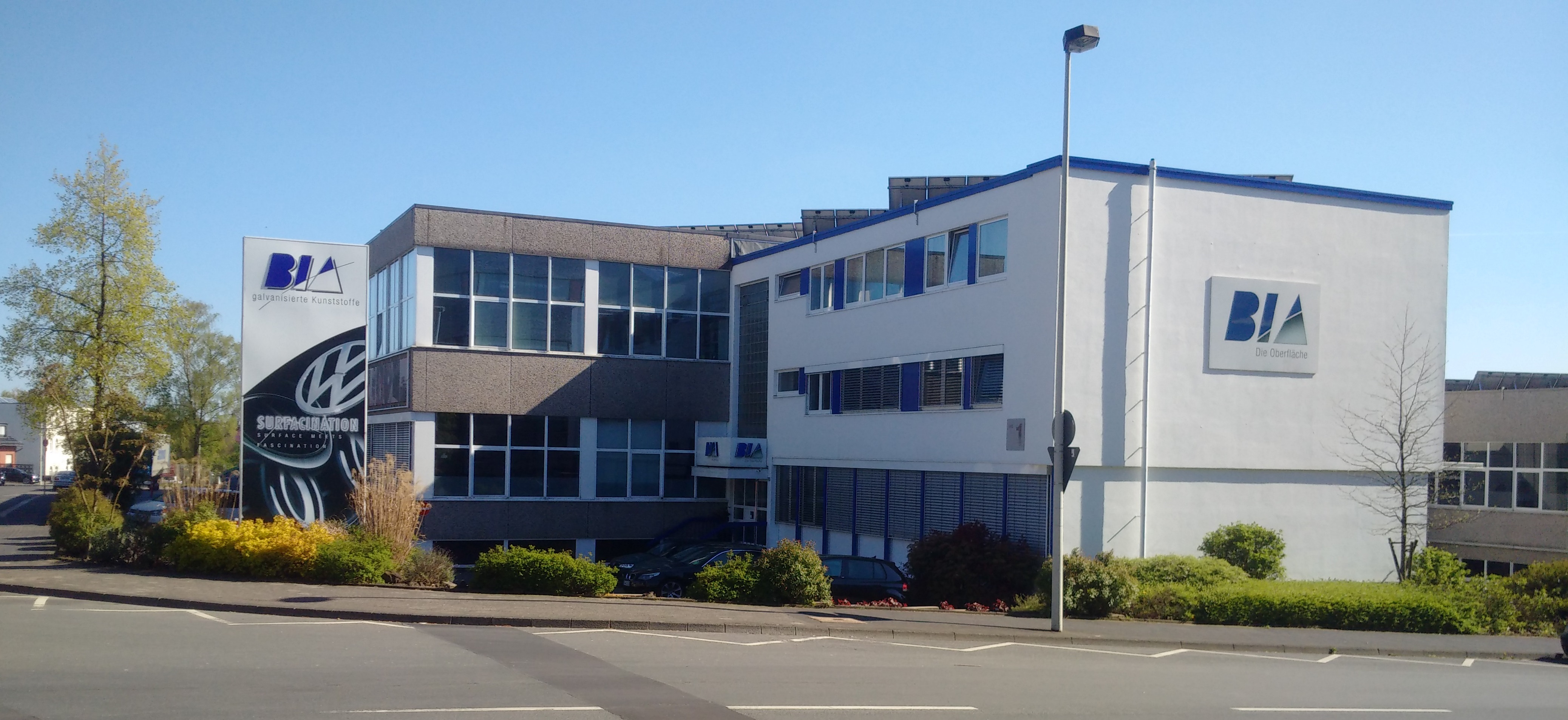 Firmensitz von Bia in Solingen-Merscheid, aufgenommen im Frühling 2016